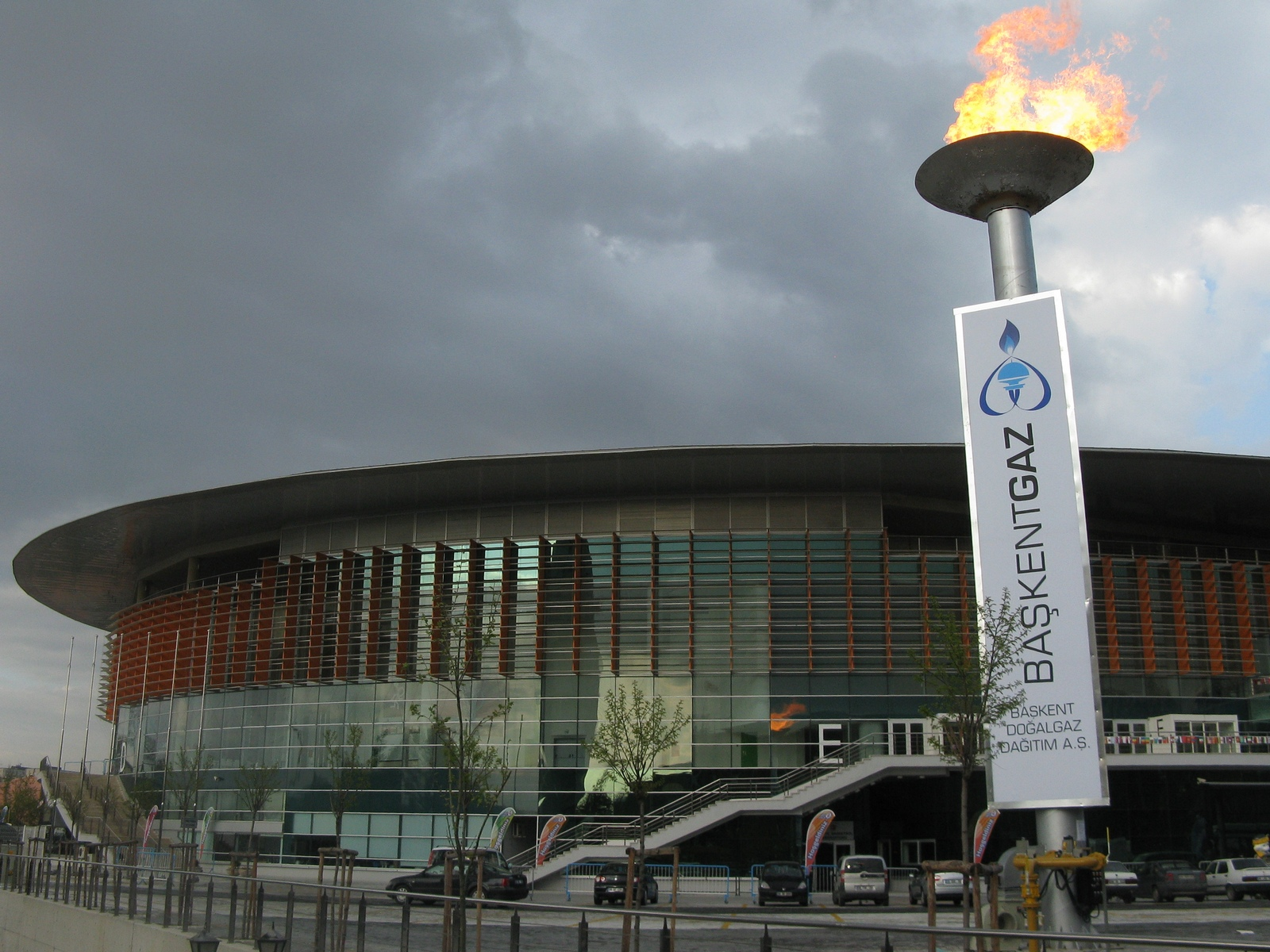 Ankara Arena